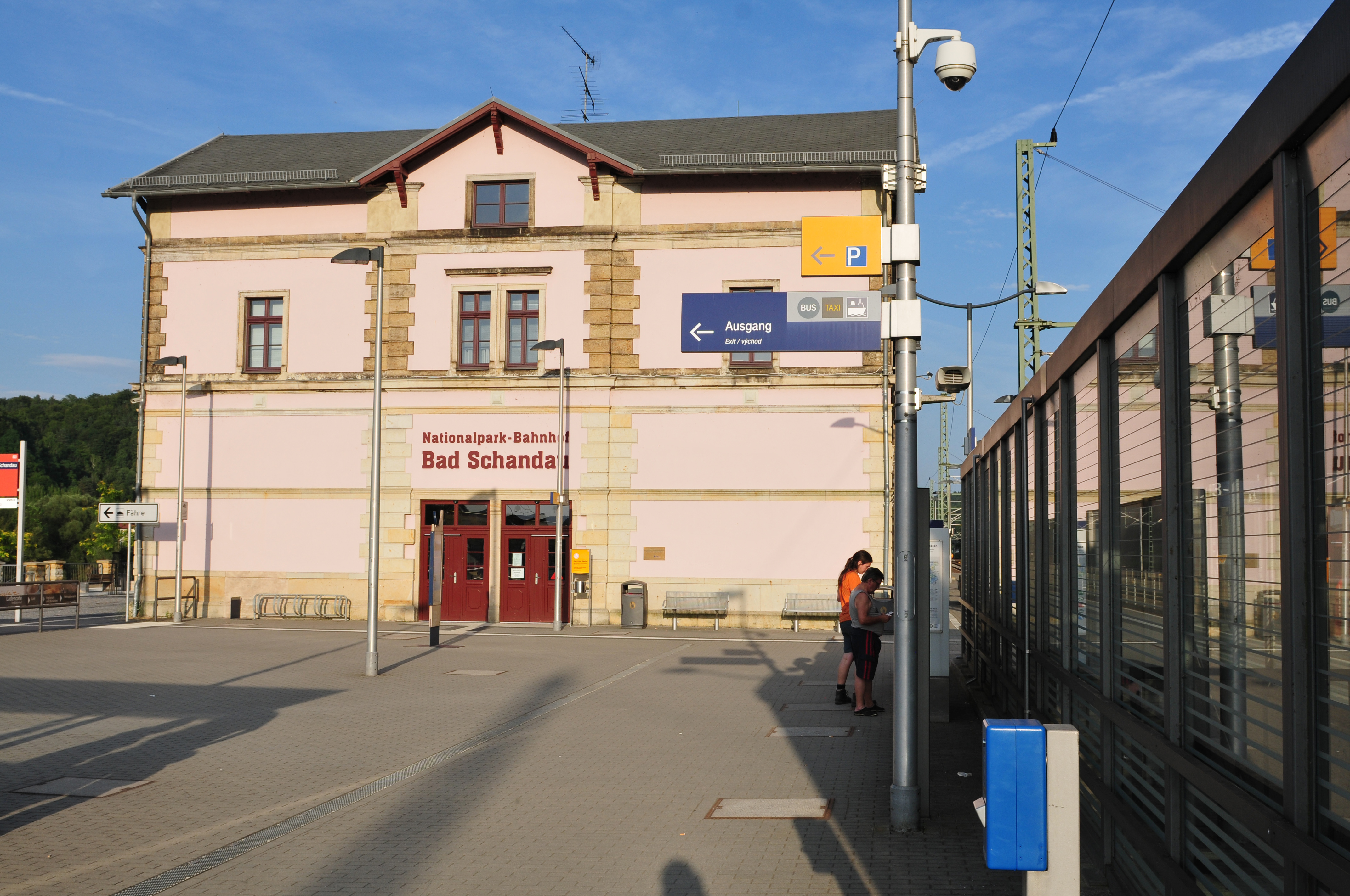 Bahnhof Bad Schandau